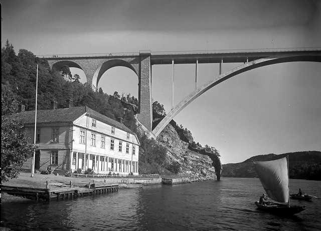 Søylegården ved Svinesund